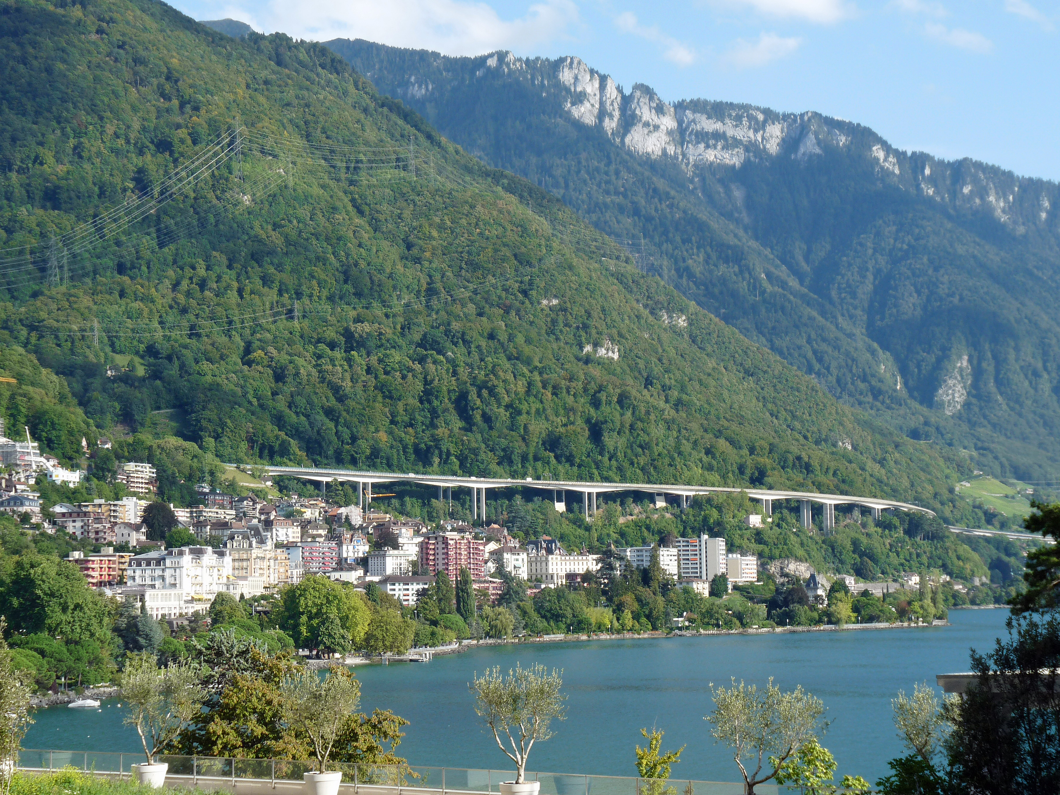 Autoroute A9 près de Montreux (Suisse)